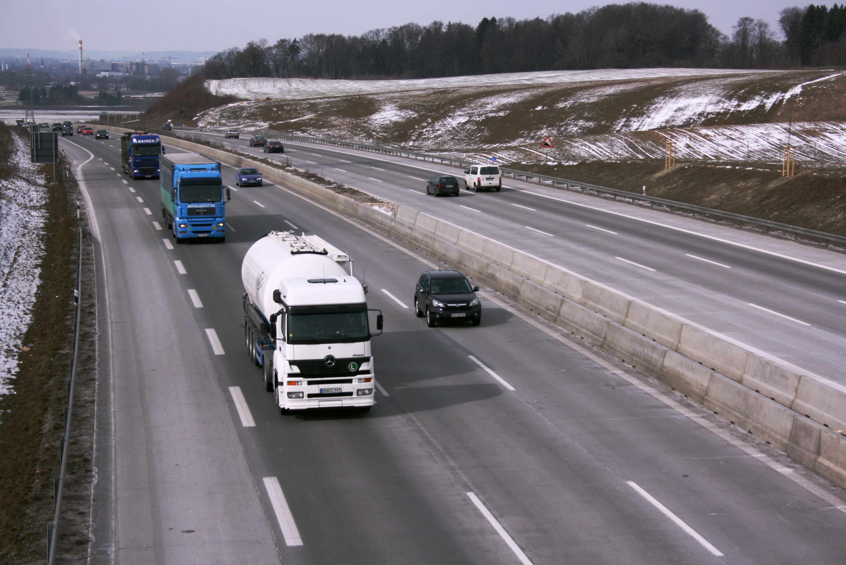 Bundesautobahn A 8 in Deutschland bei Derching. Lkw fahren Richtung München.